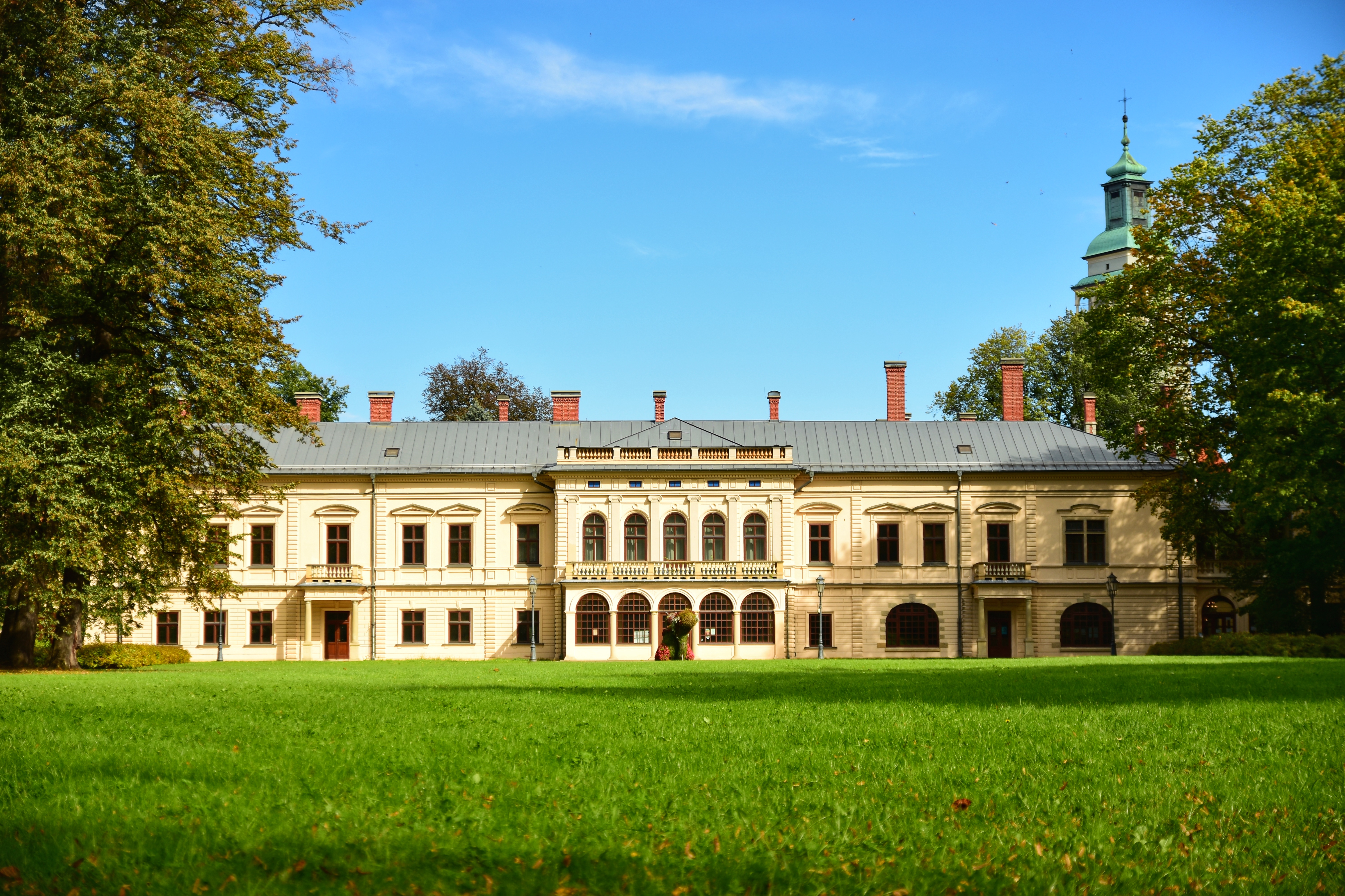 Nowy Zamek w Żywcu